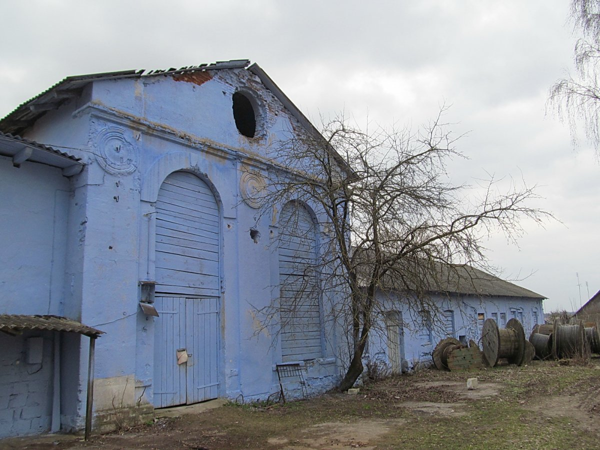 Радзівілімонты. бровар